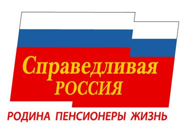 Логотип партии Справедливая Россия 2006-2010 гг.